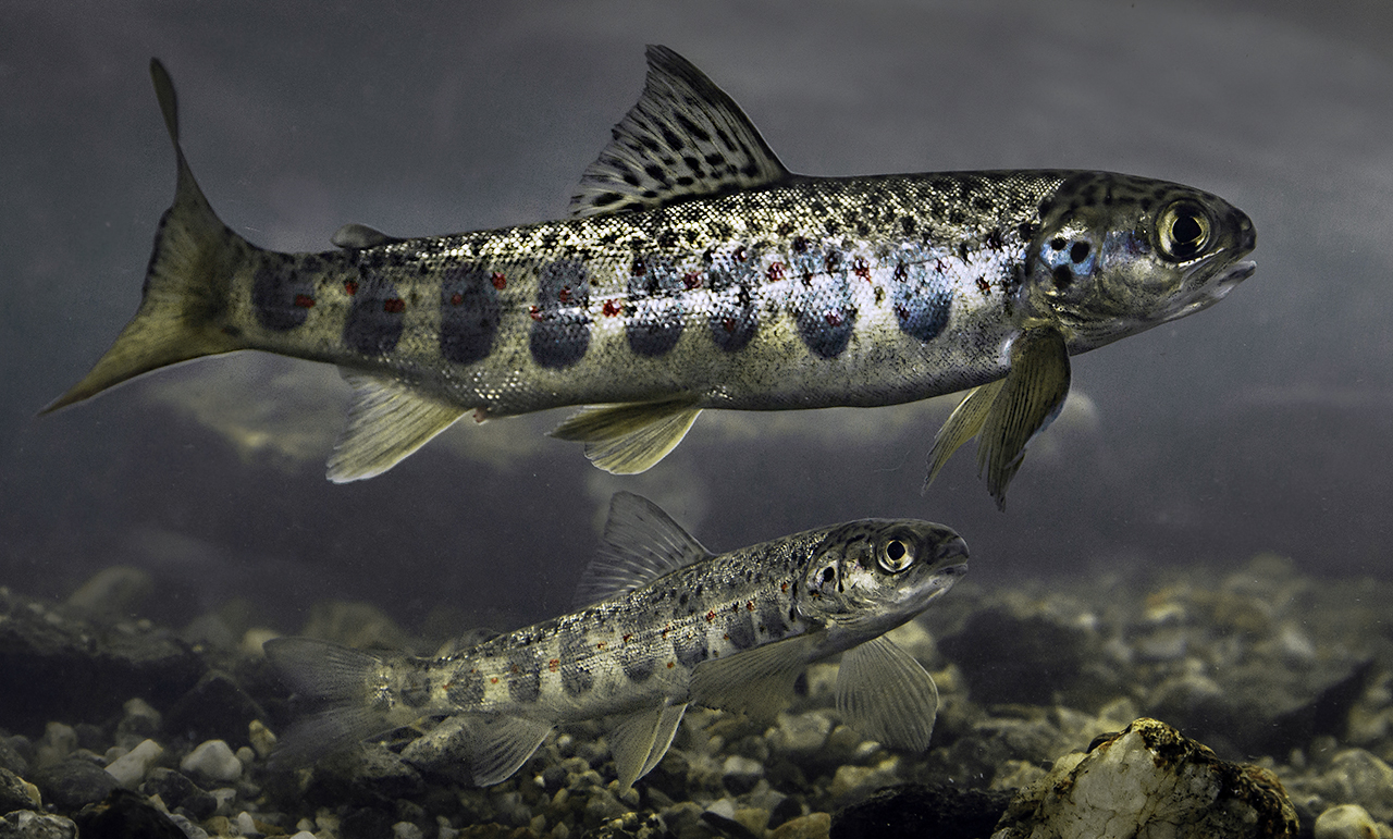 Småblank (også kalt Namsblank og blank) er en relikt laks som finnes i de øvre deler av Namsen. Småblank er en variant av atlantisk laks (Salmo salar). Den ble først beskrevet i 1953 av fiskebiologen Magnus Berg, som benyttet lokalnavnet småblank om dverglaksen i øvre deler av Namsen. Foto: Per Harald Olsen/NTNU